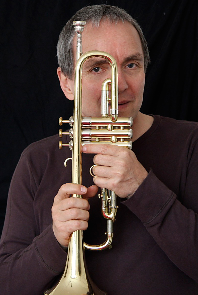 Bild von Hugo Helfenstein